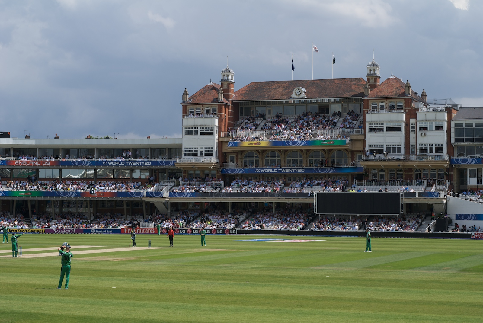 Ireland vs Pakistan